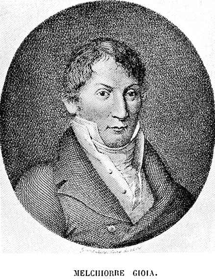 L'immagine si trova nel libro: I liberatori Glorie e figure del Risorgimento di Pasquale de Luce, stampato dall'Istituto Italiano di Arti Grafiche- Editore di Bergamo nel 1909